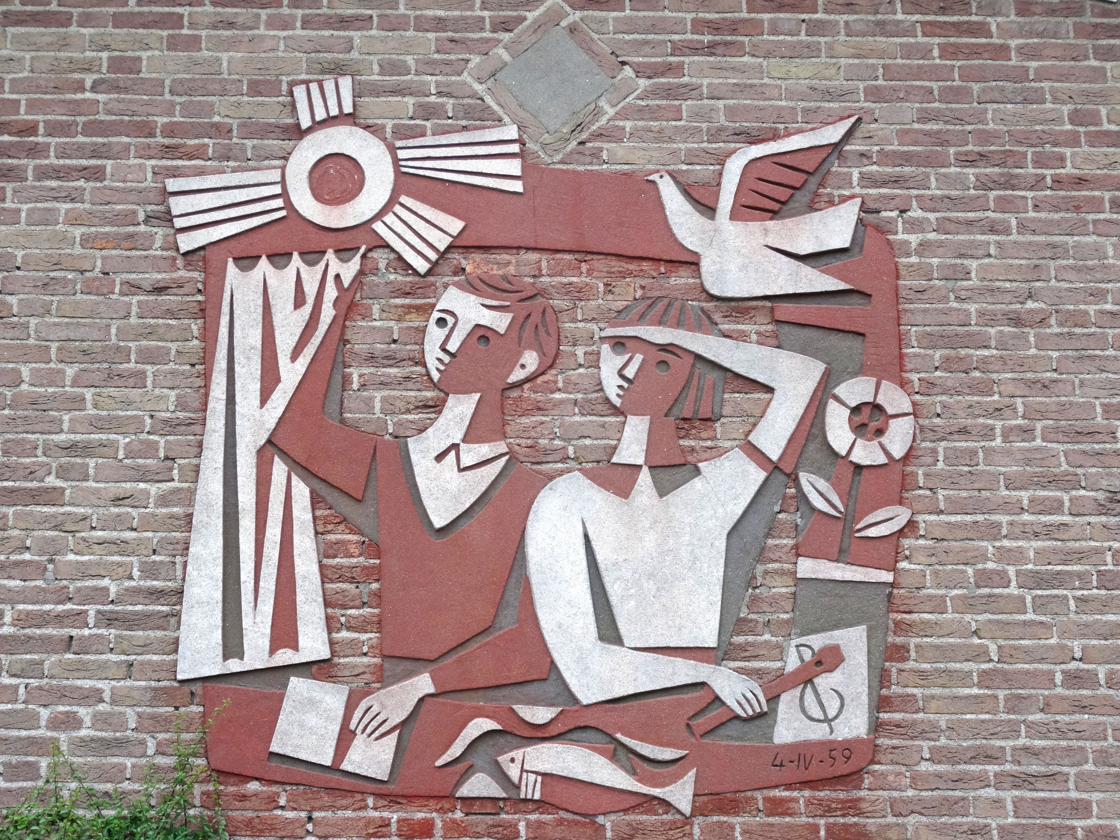 Sgrafitto bij basisschool Pius X in Bemmel, in 1959 gemaakt door Lou Manche